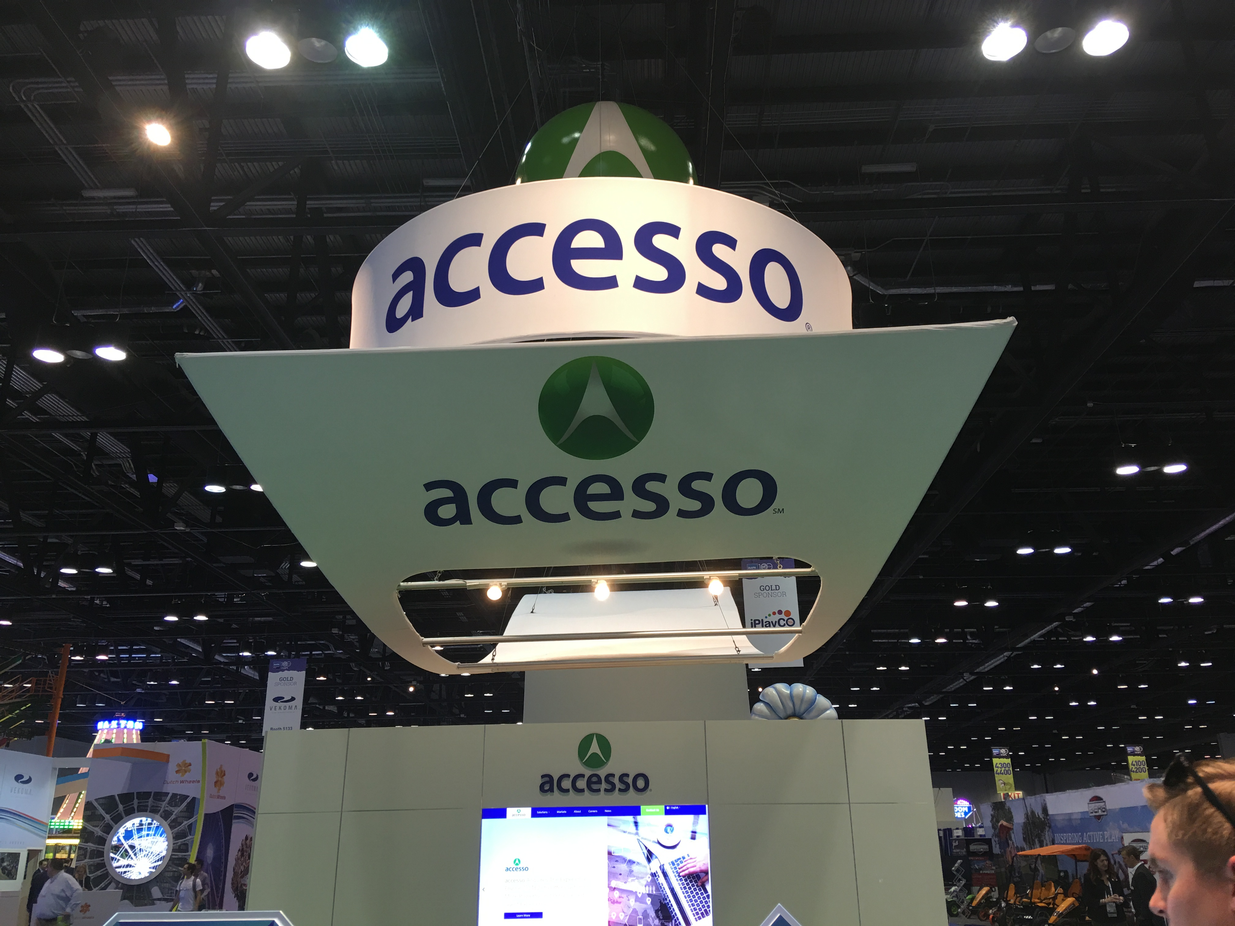 accessp